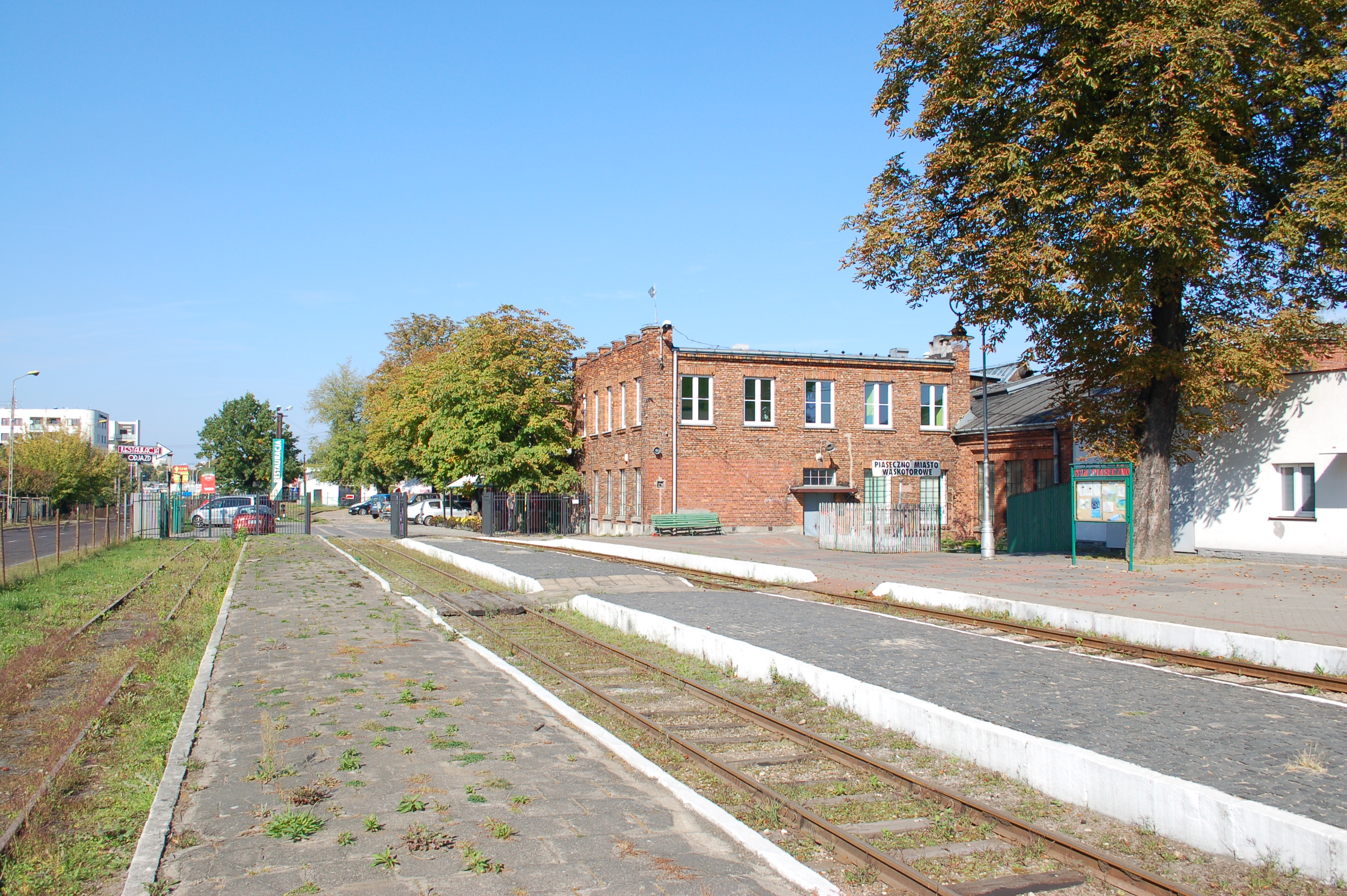 Historischer Schmalspurbahnhof in Piaseczno